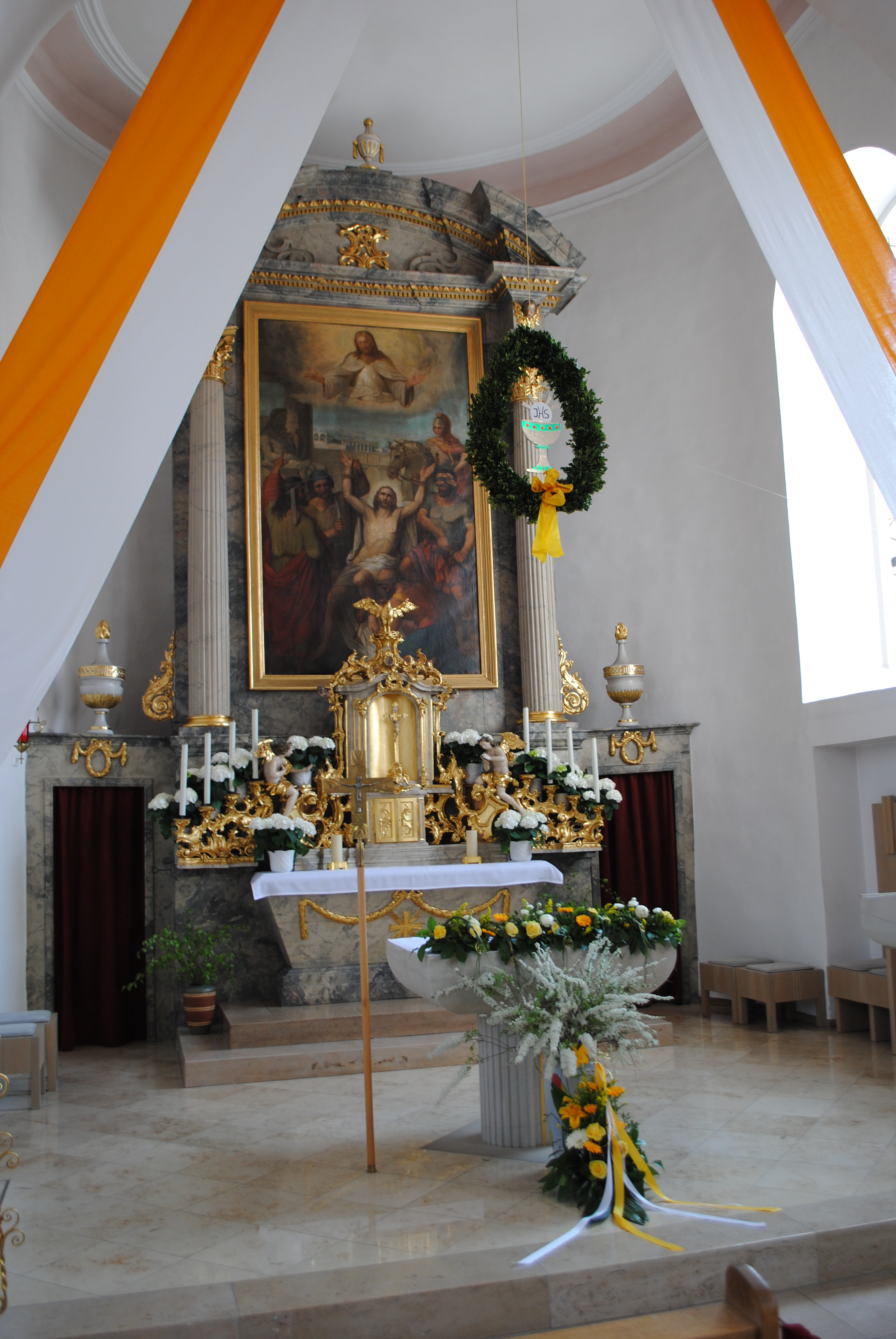 Hochaltar, Katholische Bartholomäuskirche, Rödelsee